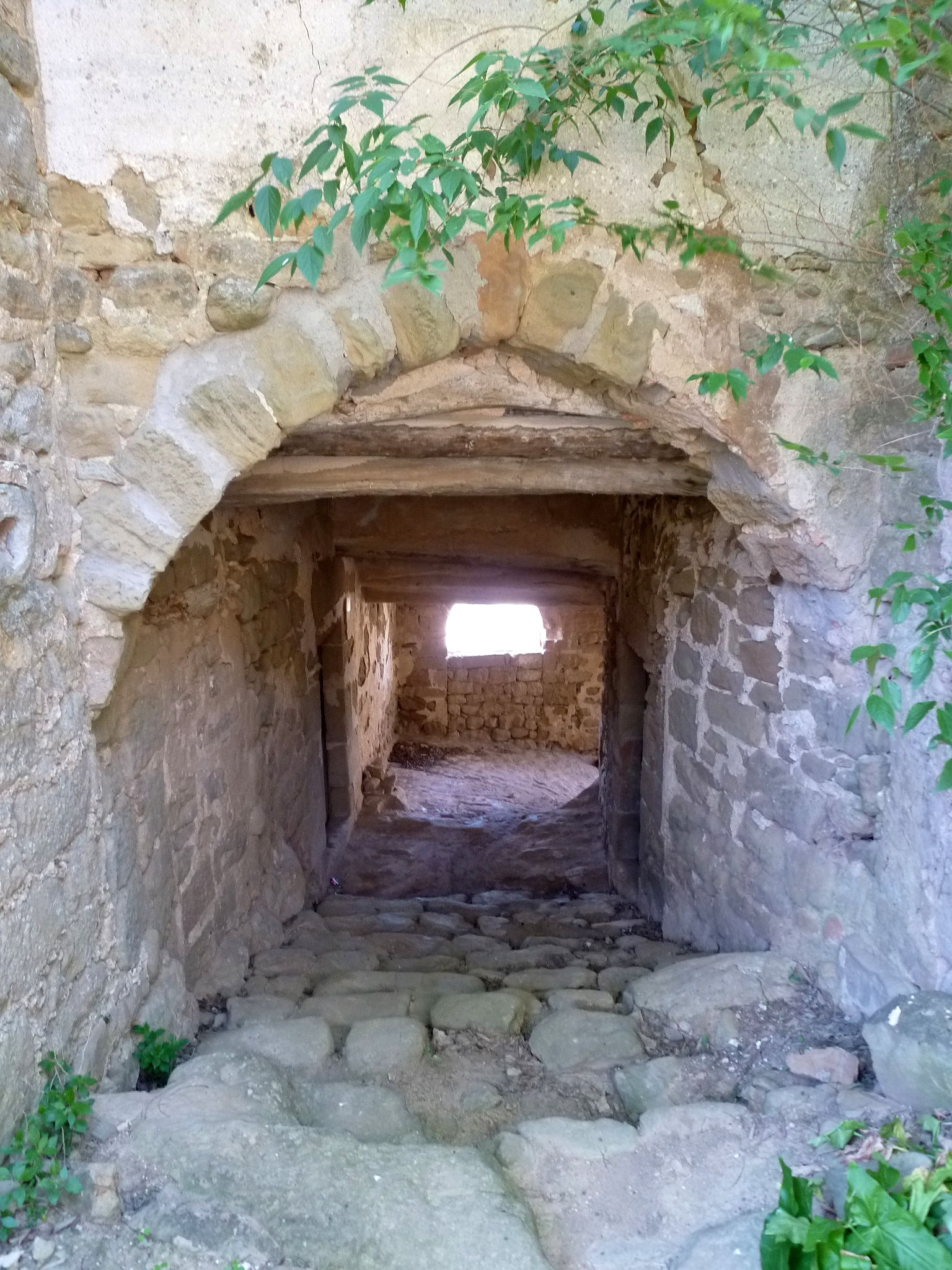 Portal de l'Aguda (Torà): pas per sota cal Coberó